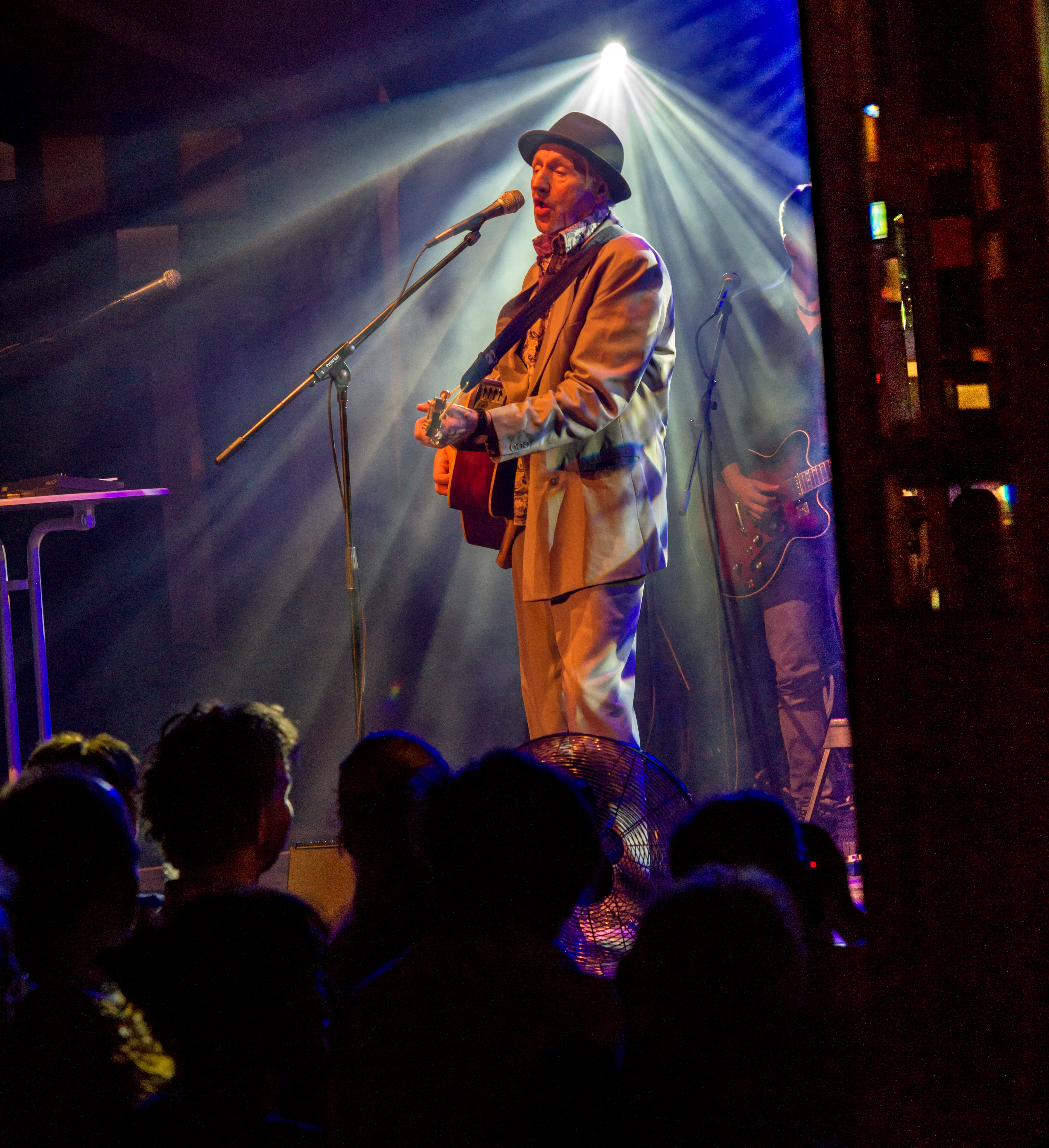 Bilder vom Zelt Musik Festival 2017 in Freiburg im Breisgau Georg Ringsgwandl und Band